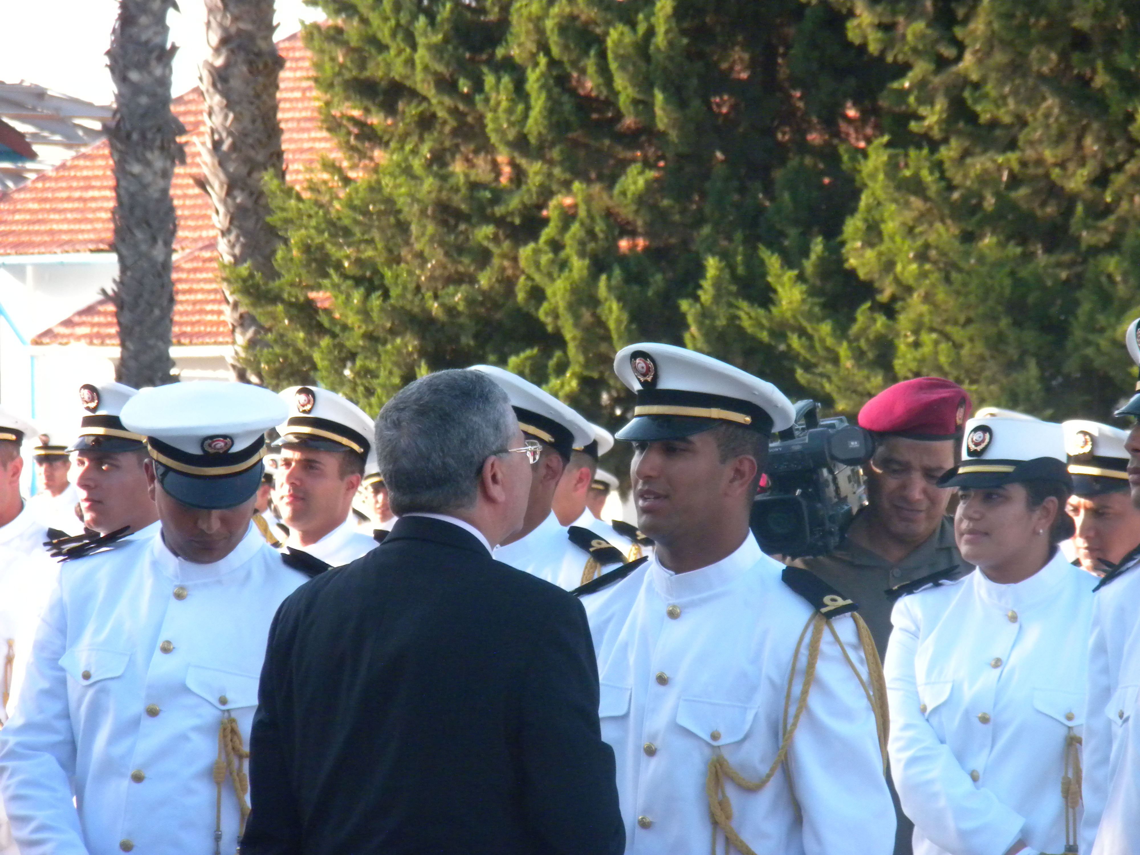 Le ministre de la défense tunisienne, Abdelkrim Zbidi, passant en revue les nouvelles promus de l'académie navale de Tunisie à Menzel Bourguiba.